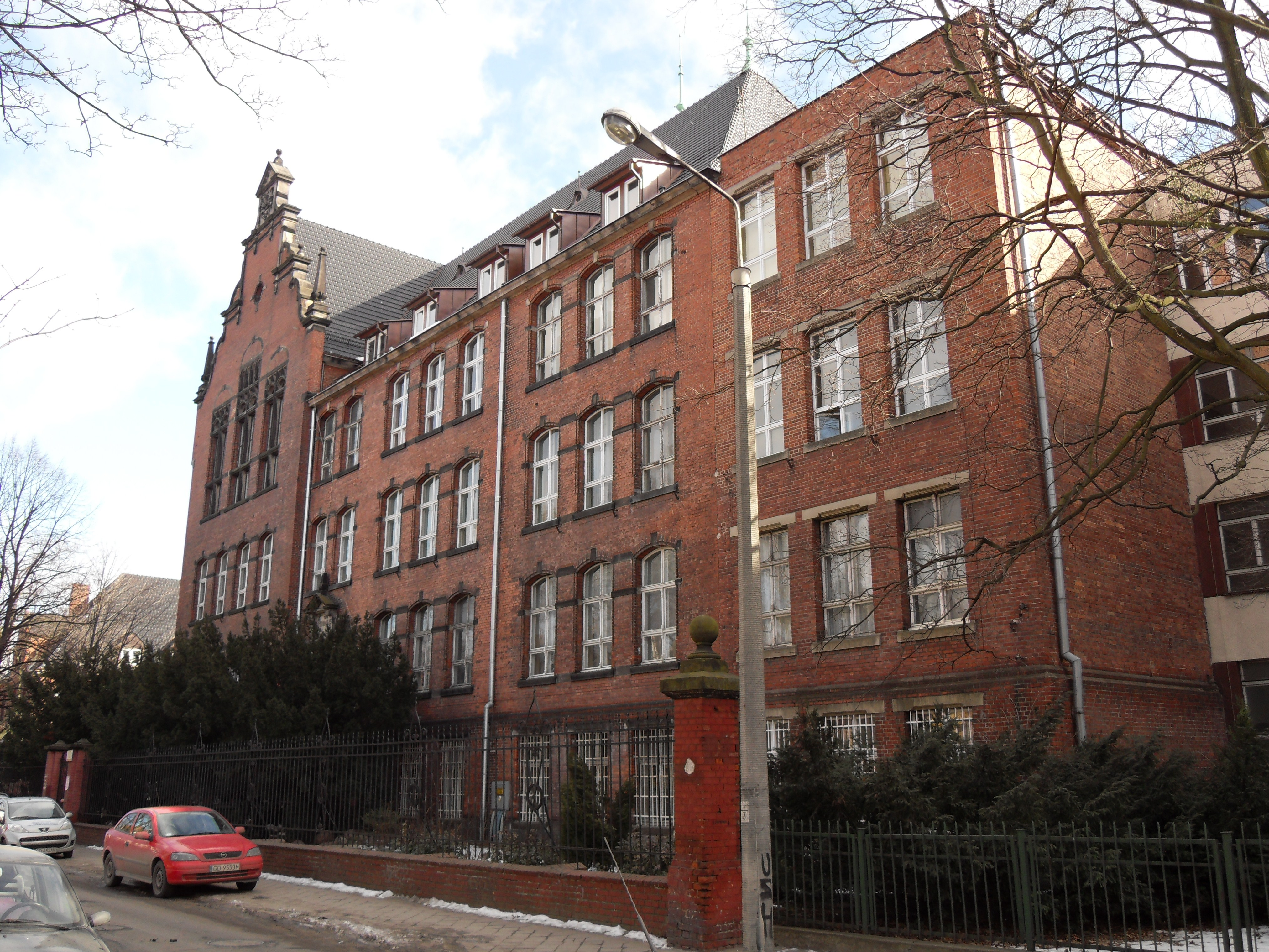 Gdańsk Wrzeszcz, szkoła Conradinum - zabytkowa część gmachu.